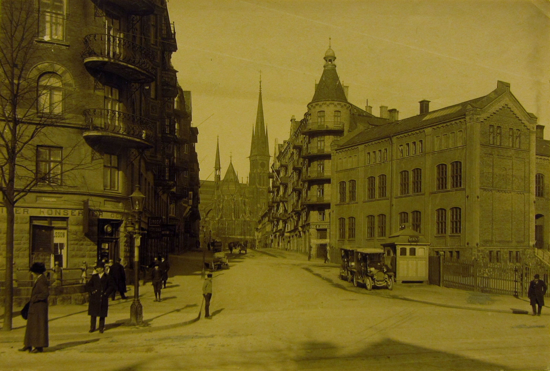 Prinsgatan mot väster, sedd från Linnégatan. Till höger Viktoriaskolan.